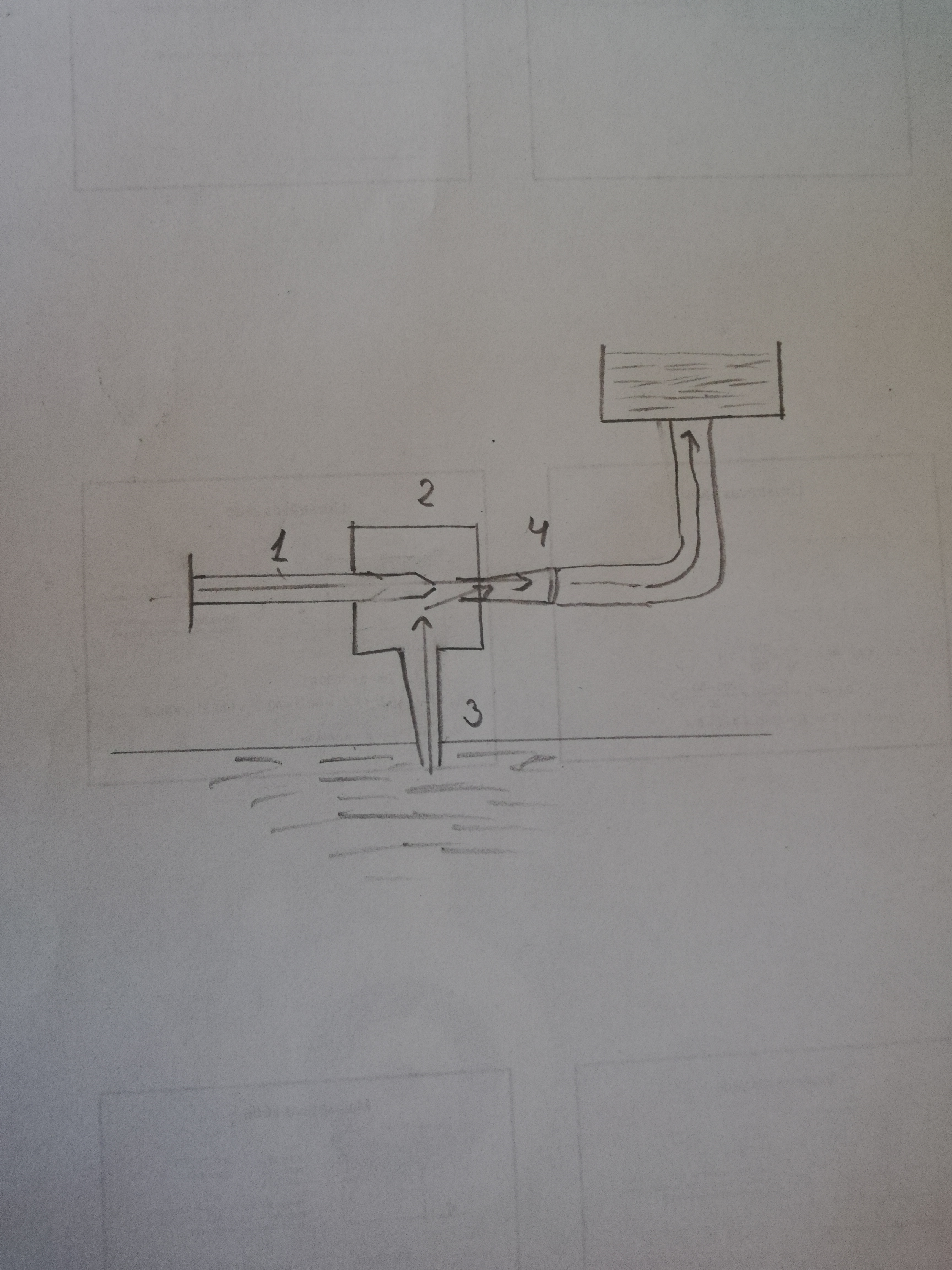 Strūklas sūkņa darbība shema